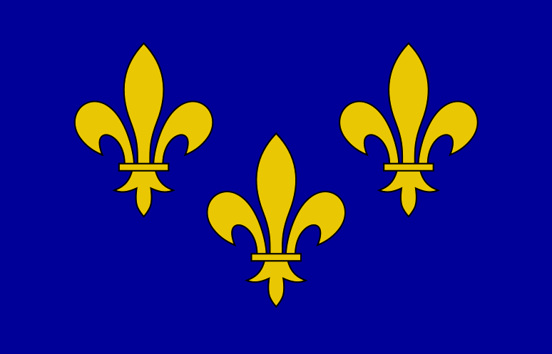 Pavillon royal de la France